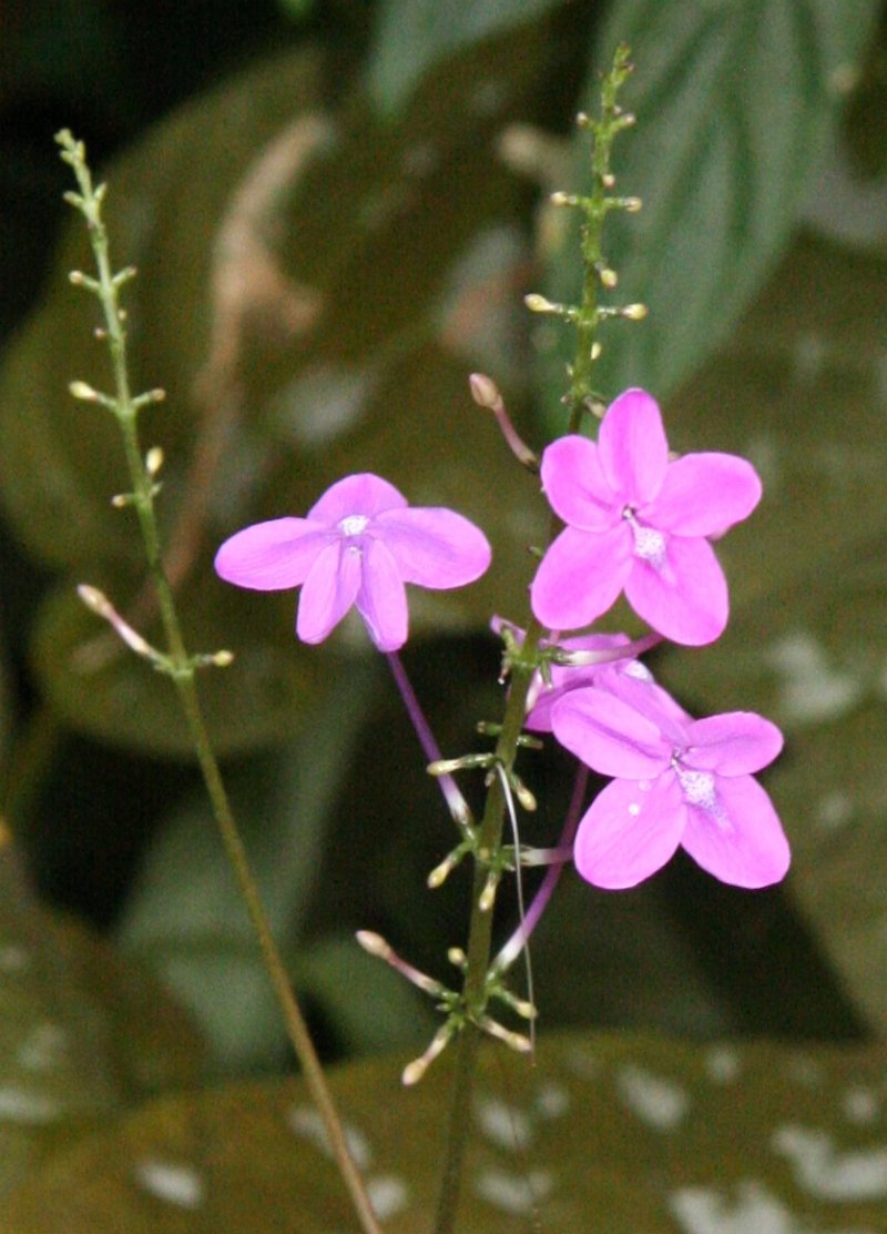 Pseuderanthemum alatum, Flower